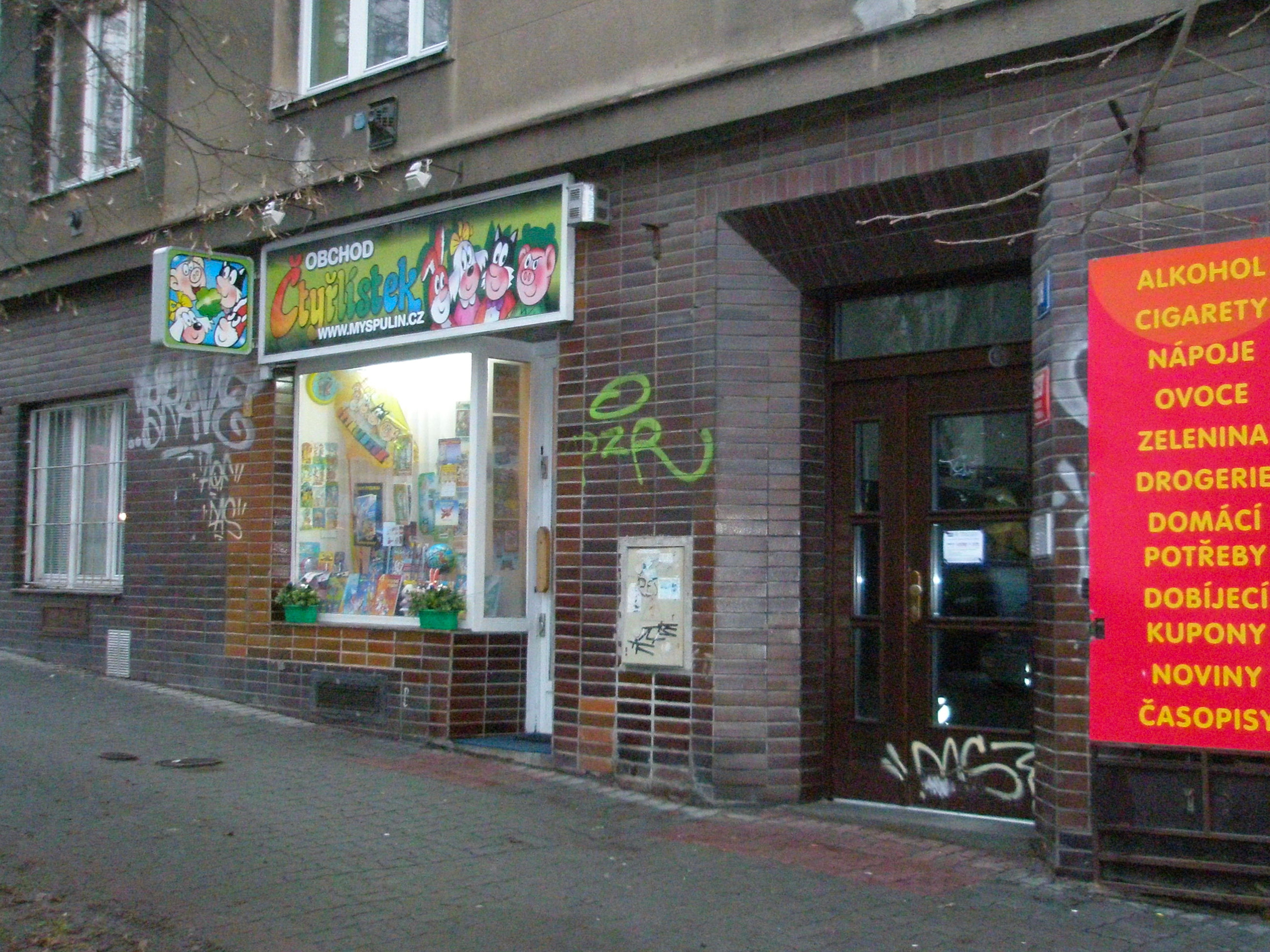 Obchod Čtyřlístku